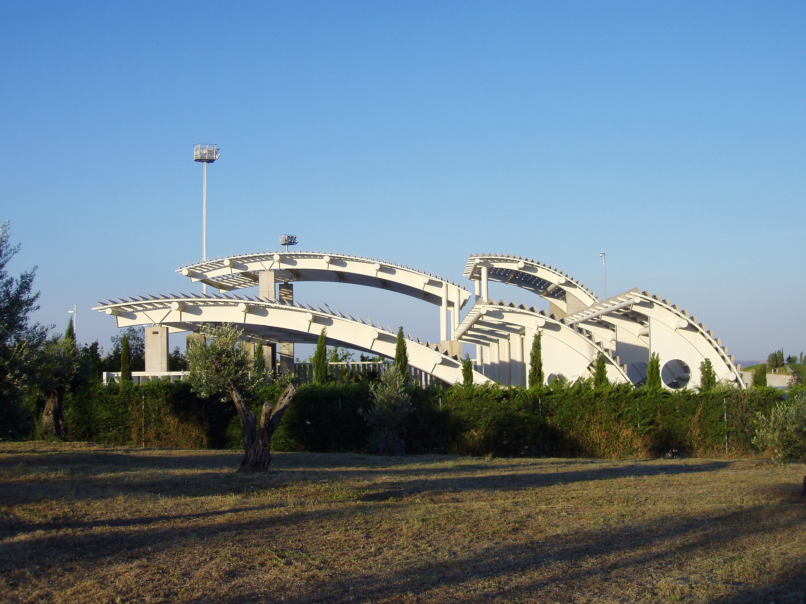 Estufa fría en el Parque Juan Carlos I